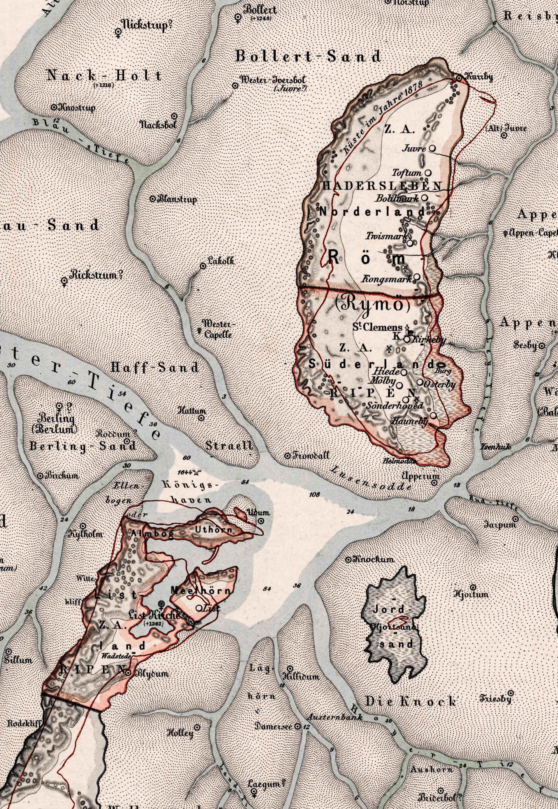 Historische Karte von den Nordfriesischen Inseln Nordstrand, Pellworm, Amrum, Föhr, Sylt etc. der continentalen Marsch zwischen Hever und Königsau, sowie der Friesischen Vorgeest. Redigirt für die Zeit von 1643 bis 1648, mit besonderer Berücksichtigung der vor dem Jahre 1643 untergegangenen Köge, Kirchen, Ortschaften etc.